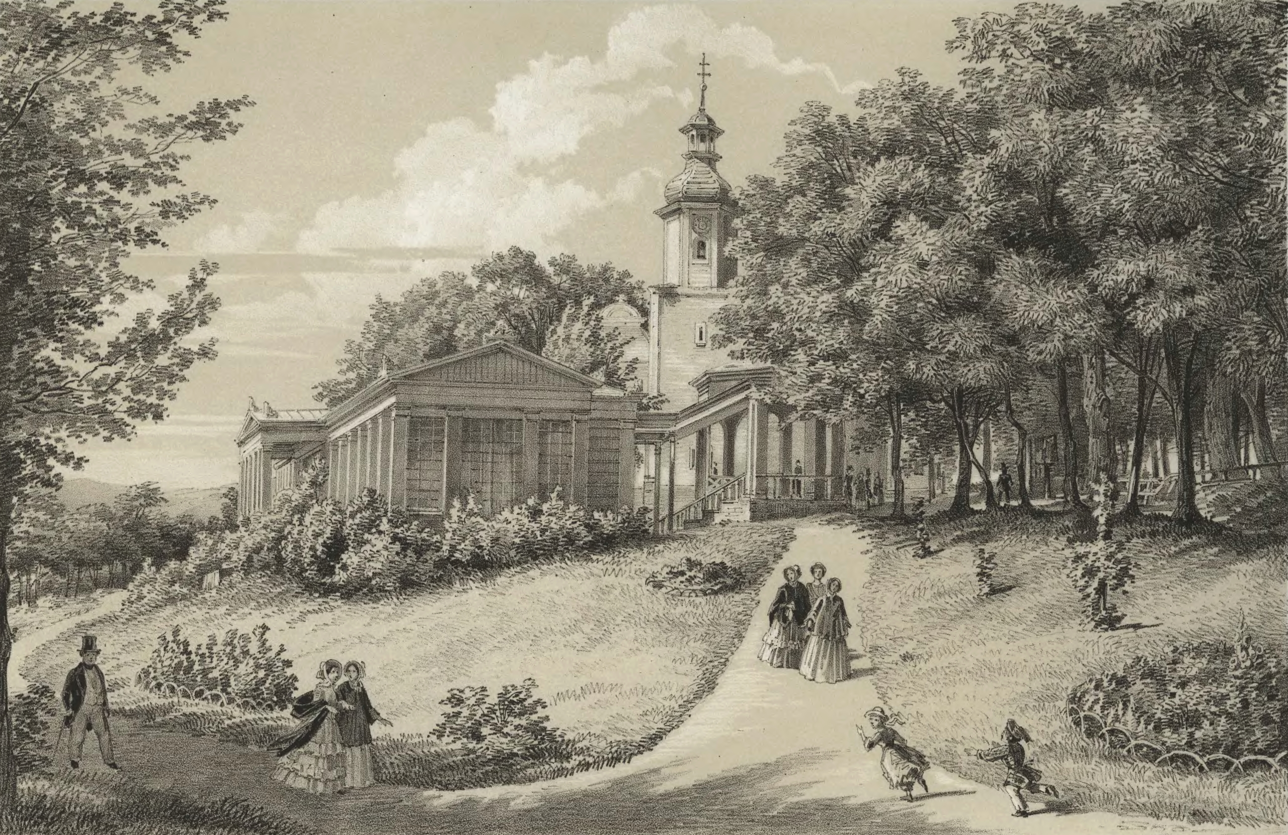 Die Albrechtshalle in Landeck in der Grafschaft Glatz im 19. Jahrhundert. Zeichnung von Ferdinand Koska, Lithografie von Wilhelm Loeillot (1827–1876).